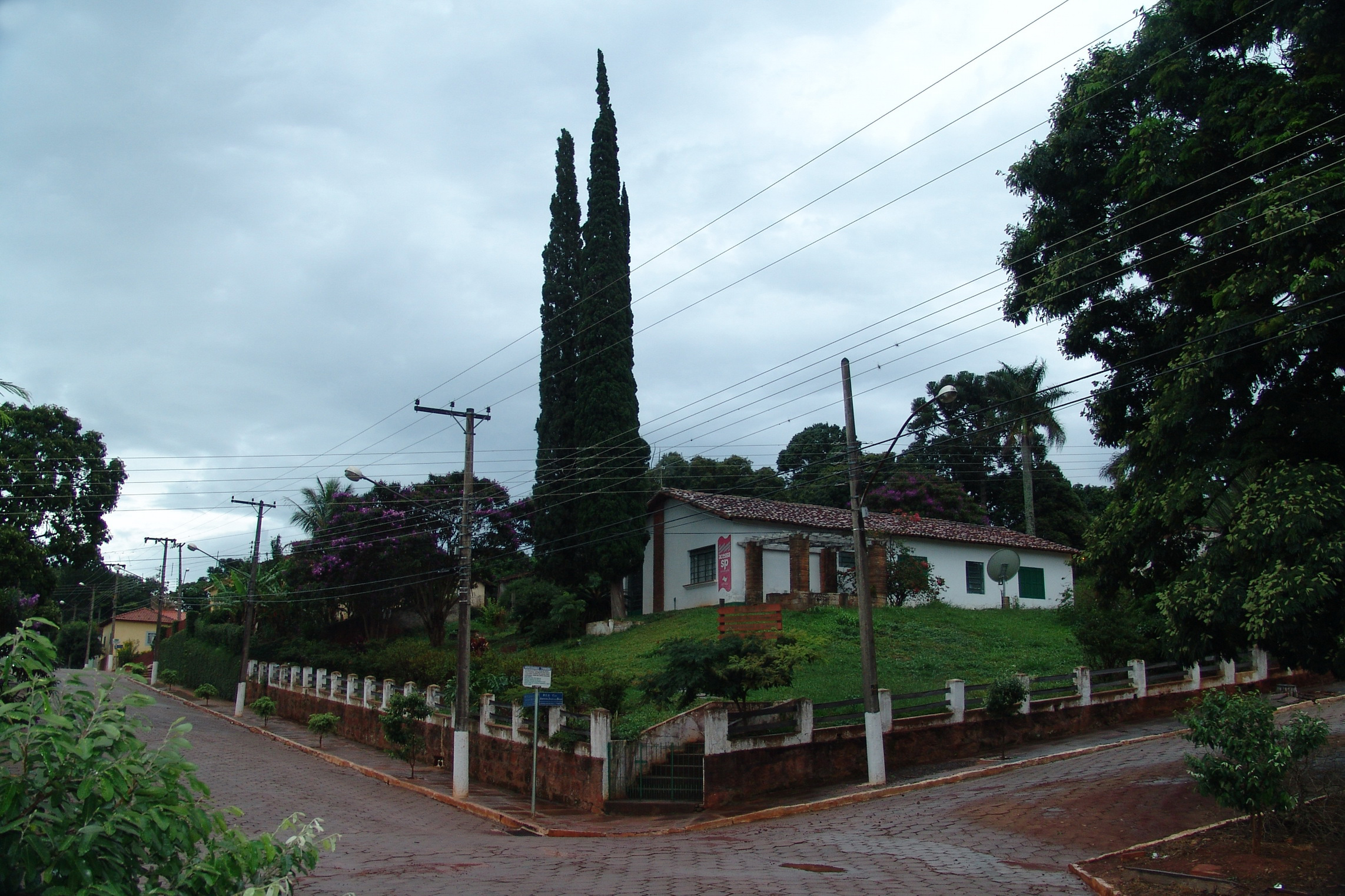 Município de Timburi Brasil